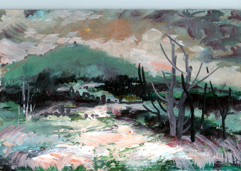 Stanislav Příhoda